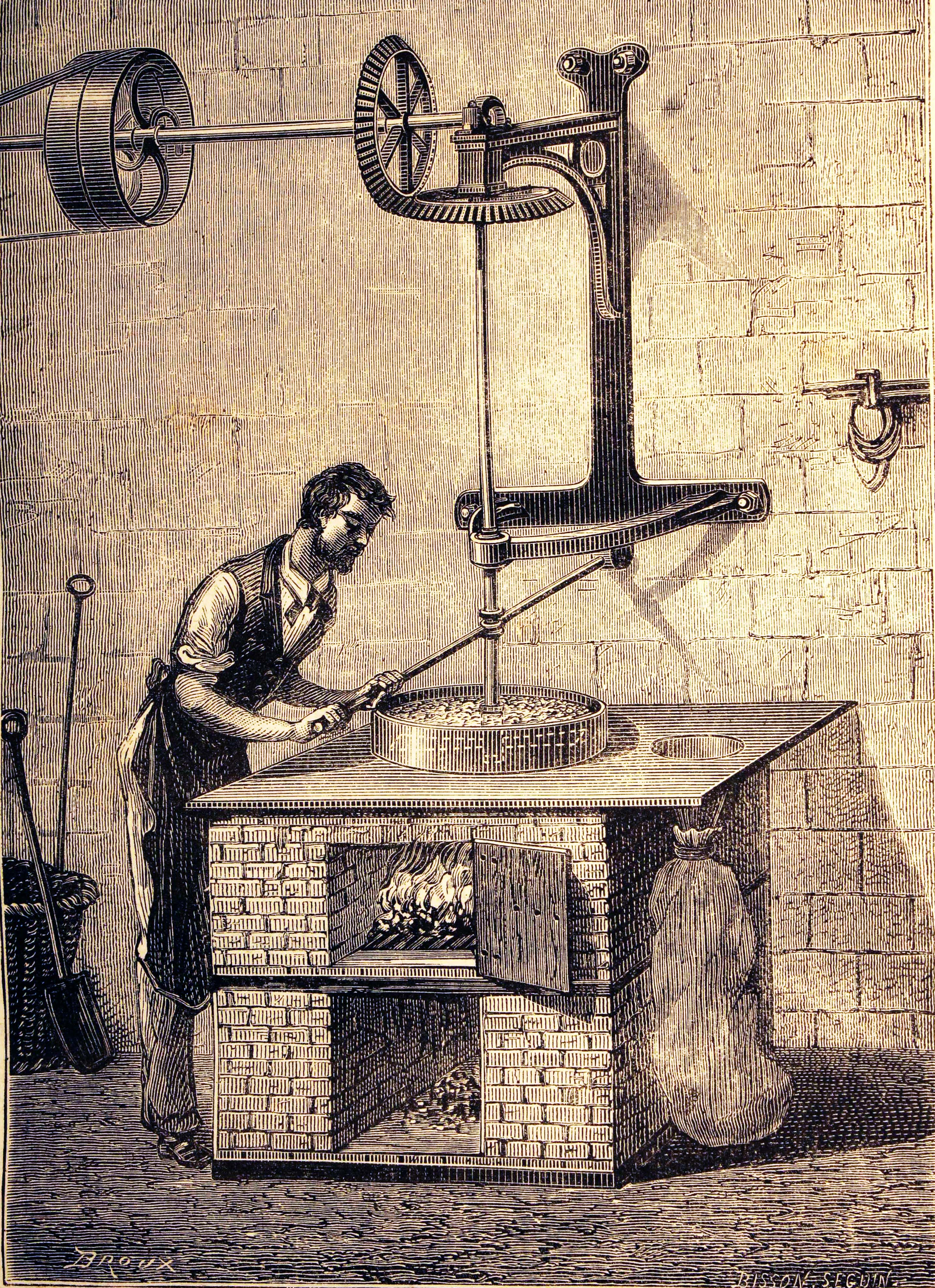 Ilustraciones de la obra : Les merveilles de l'industrie ou, Description des principales industries modernes / par Louis Figuier. - Paris : Furne, Jouvet, [1873-1877]